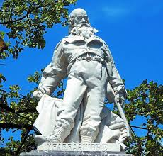 Estatua de Jose Mari Iparragirre, en la plaza Iparrragirre de Urretxu